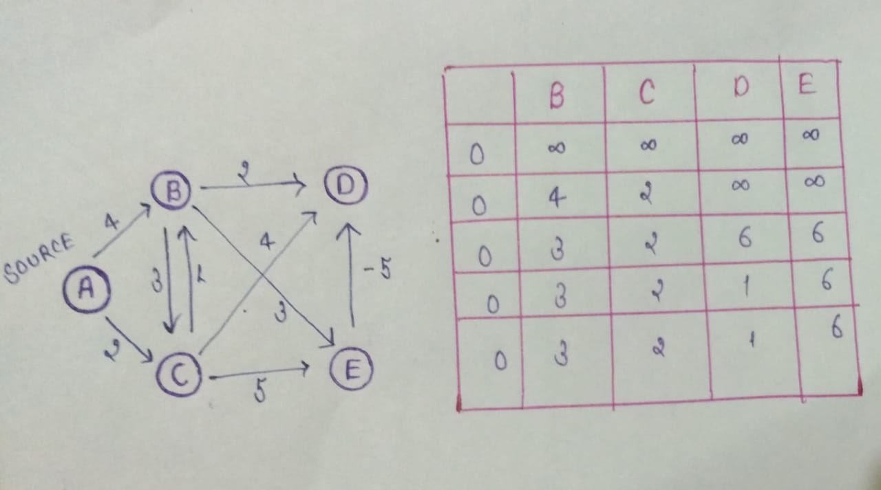 बेलमैन फोर्ड एल्गोरिथ्म मार्ग की लंबाई को शुरुआती शीर्ष से अन्य सभी शीर्षों तक कम करके काम करता है। फिर यह नए अनुमानों को खोजकर उन अनुमानों को शिथिल कर देता है जो पहले से कम कर दिए गए रास्तों से कम हैं।